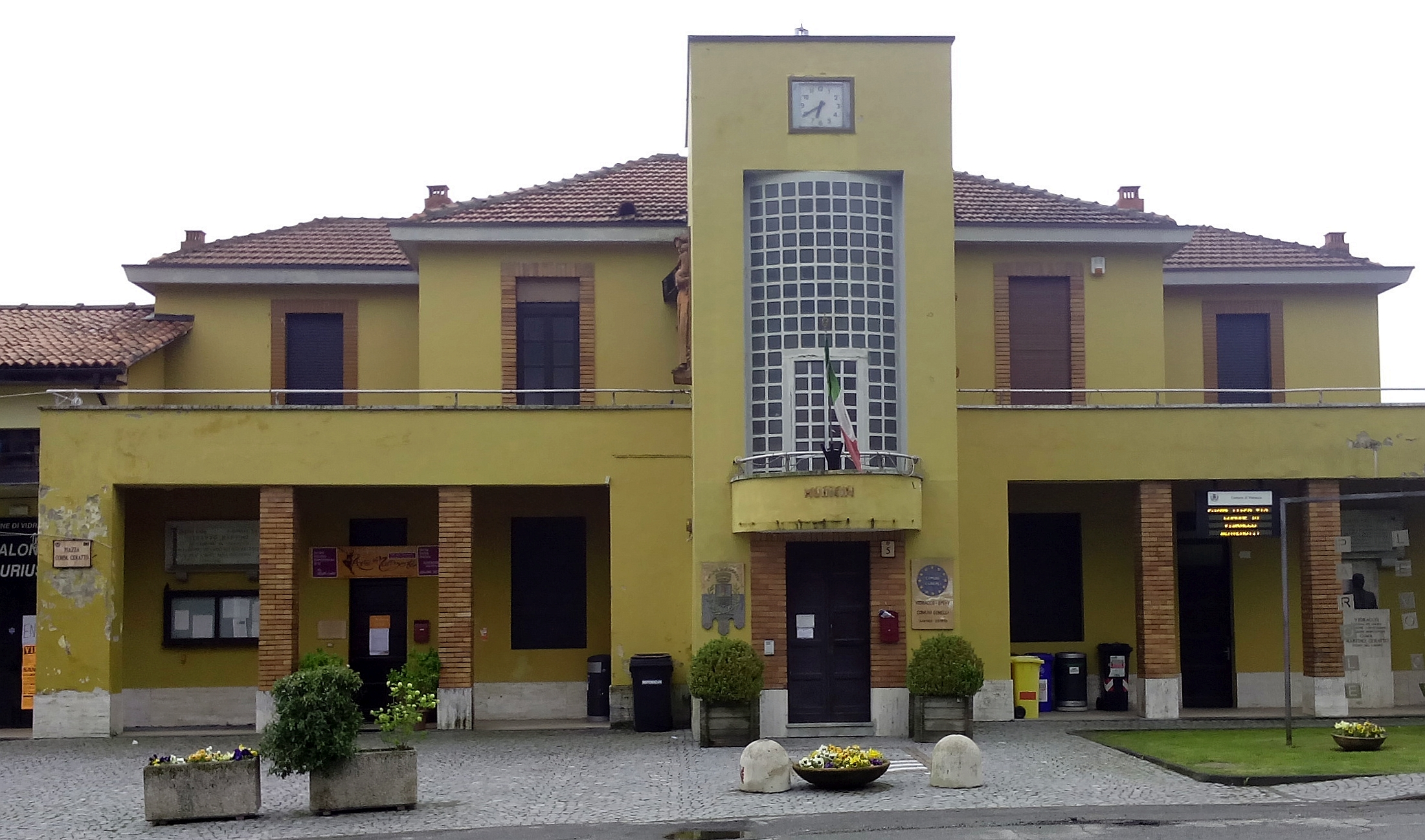 Vidracco (TO): il muunicipio